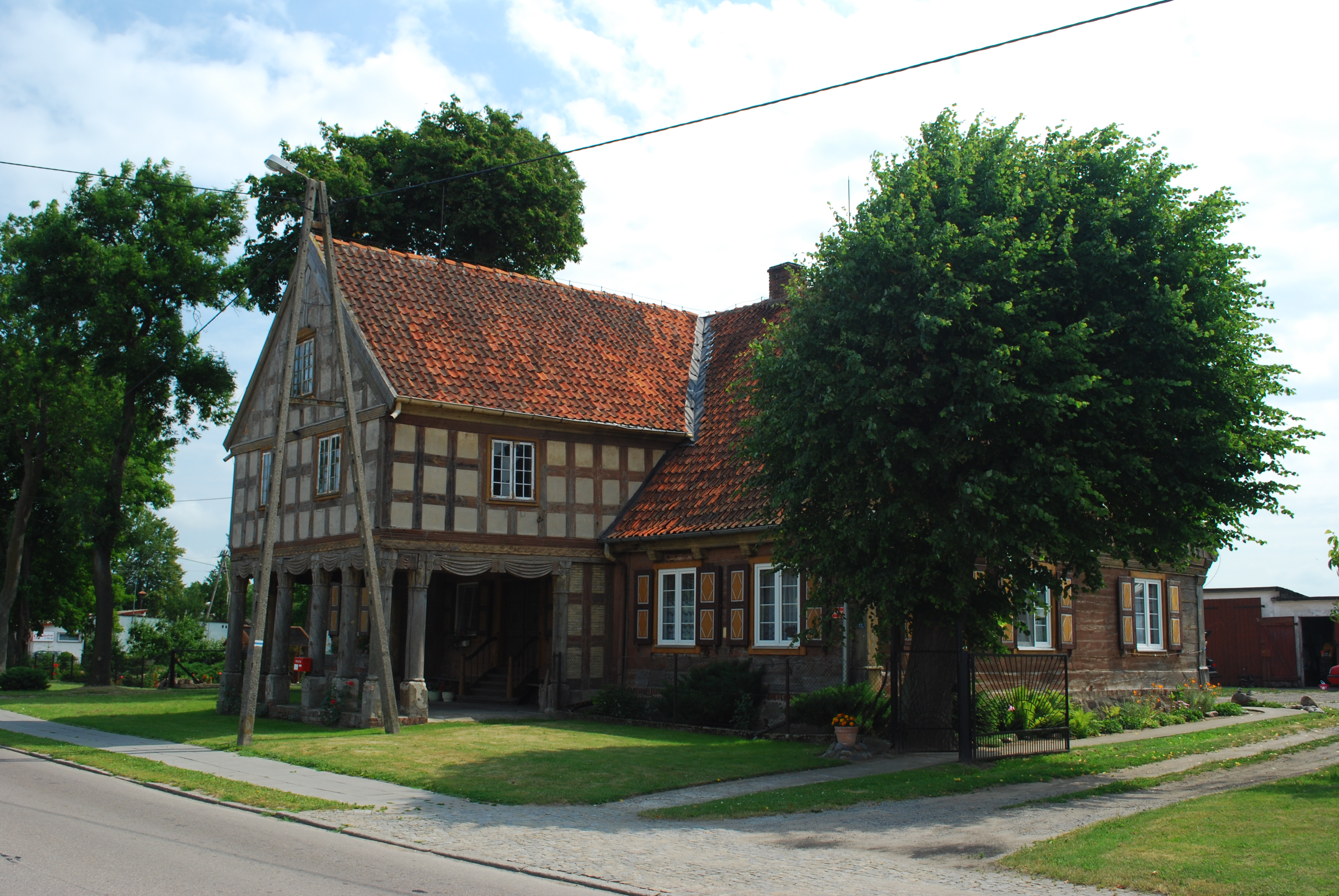 Nowa Kościelnica - mennonicki dom podcieniowy 50/51 (dec. 41)